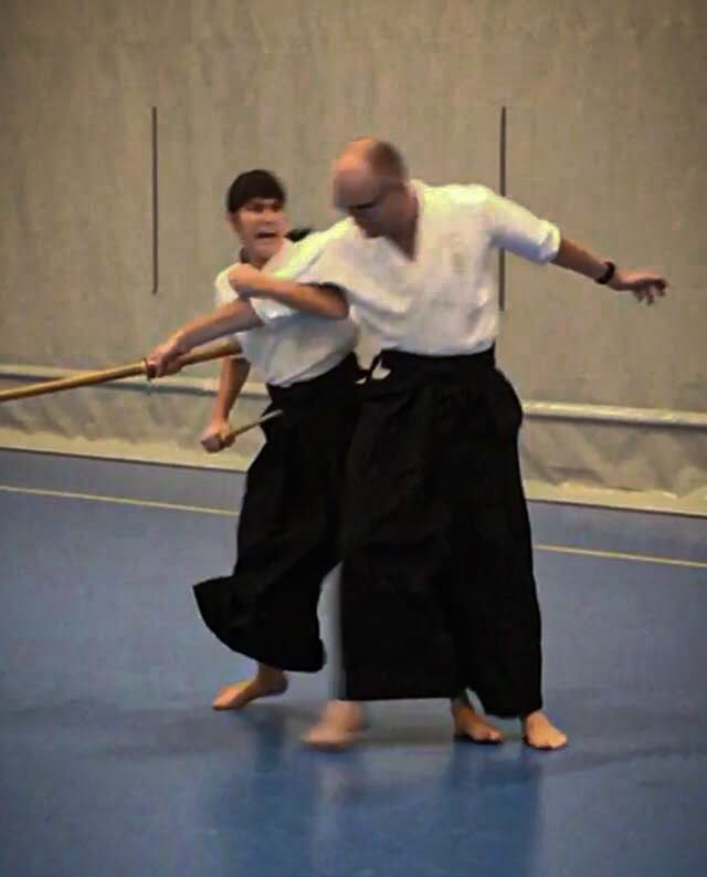 Tendo-ryu tantojutsu